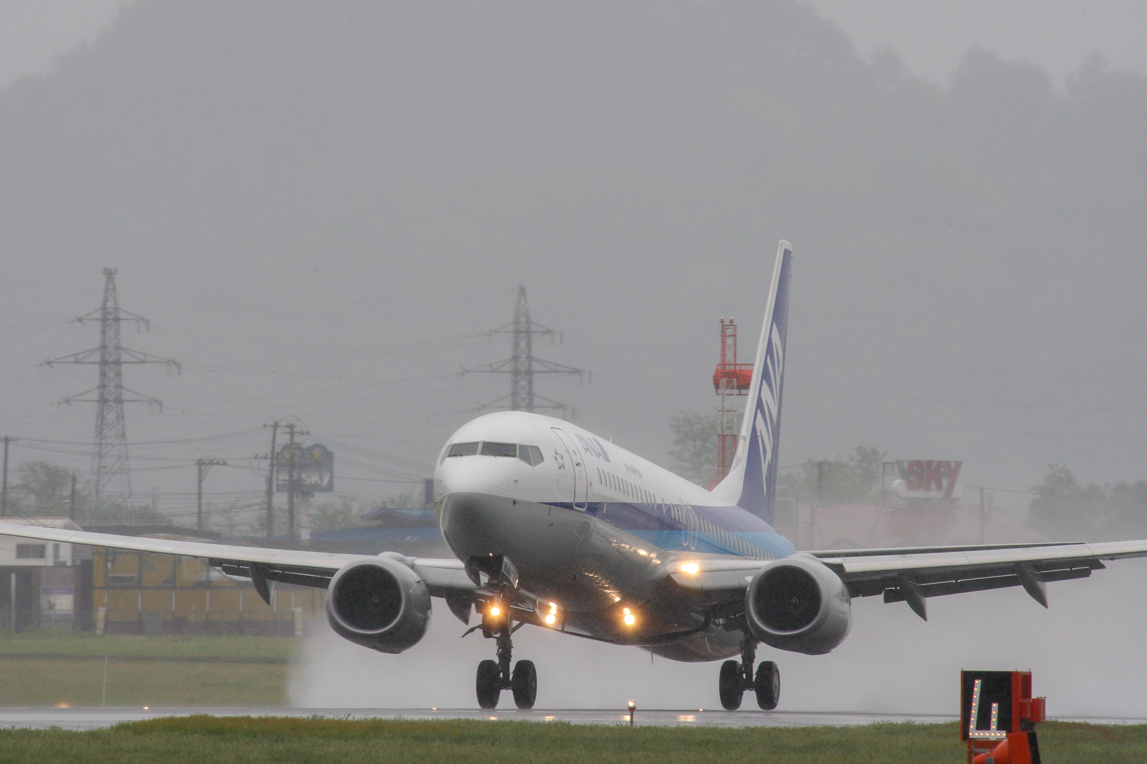 山形空港で撮影された、ANAのJA63AN Boeing 737-881。 東日本大震災の影響で被災地支援の拠点となり、乗客が大幅に増加した山形空港への対応で、臨時便として就航した。